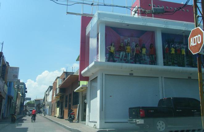 Vista de un local de ropa en Uriangato